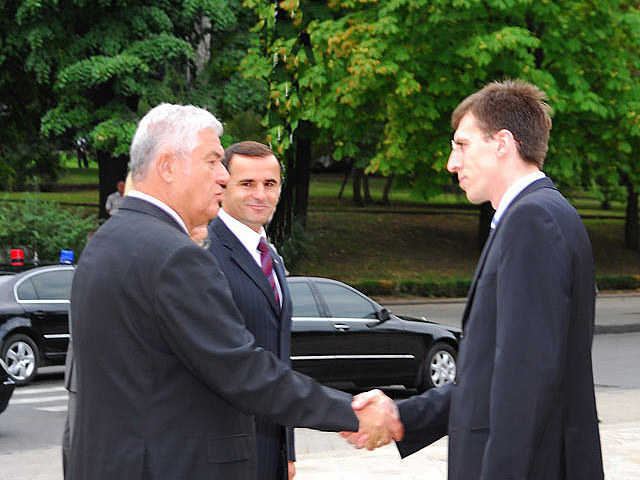 Alături de Vladimir Voronin se află şi premierul de atunci a Republicii Moldova, Vasile Tarlev. Sursa: Chisinau.md